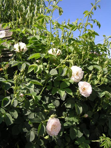 Rosa alba unknown cultivar